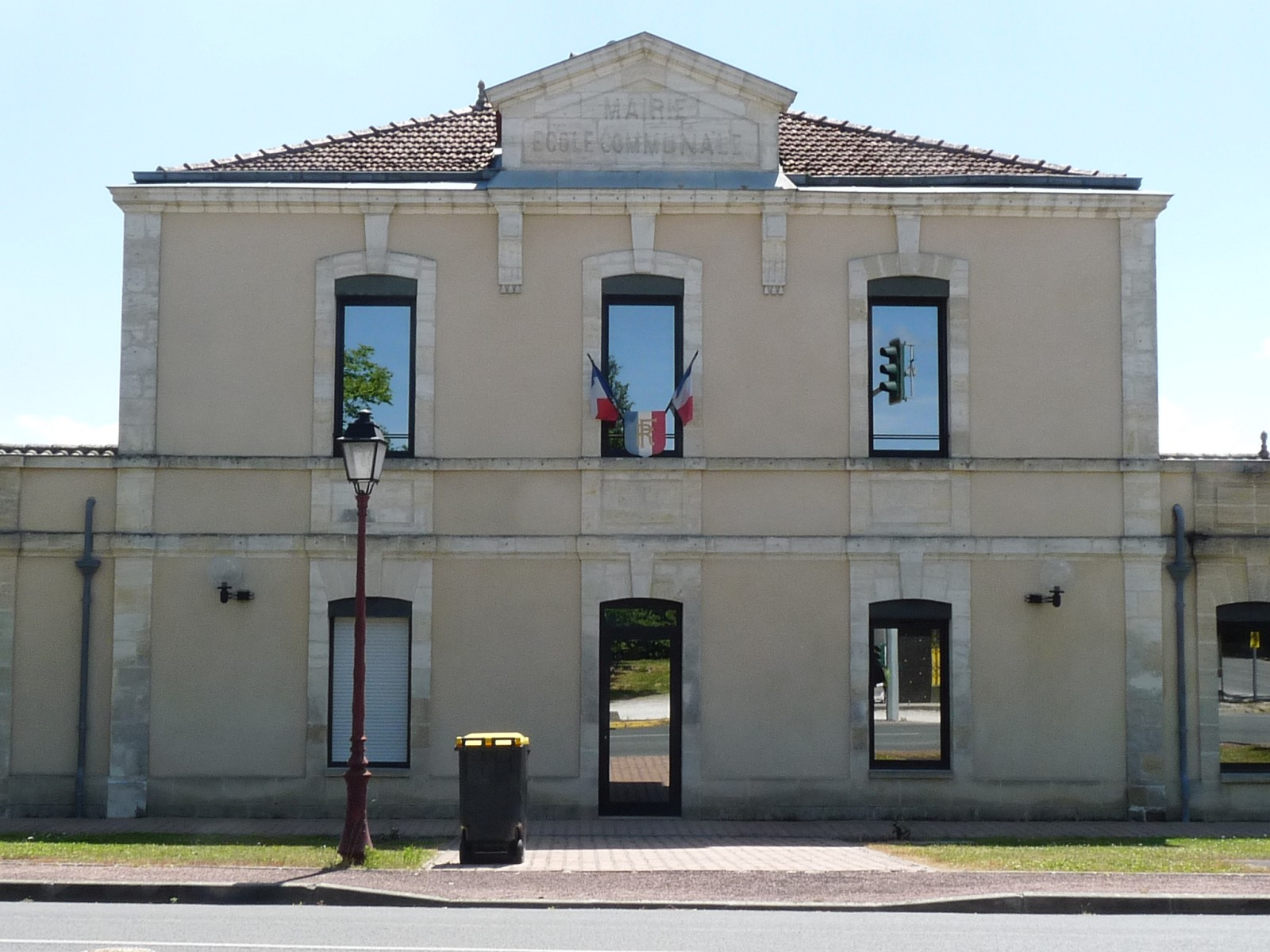 Mairie de Vérac, Gironde, France